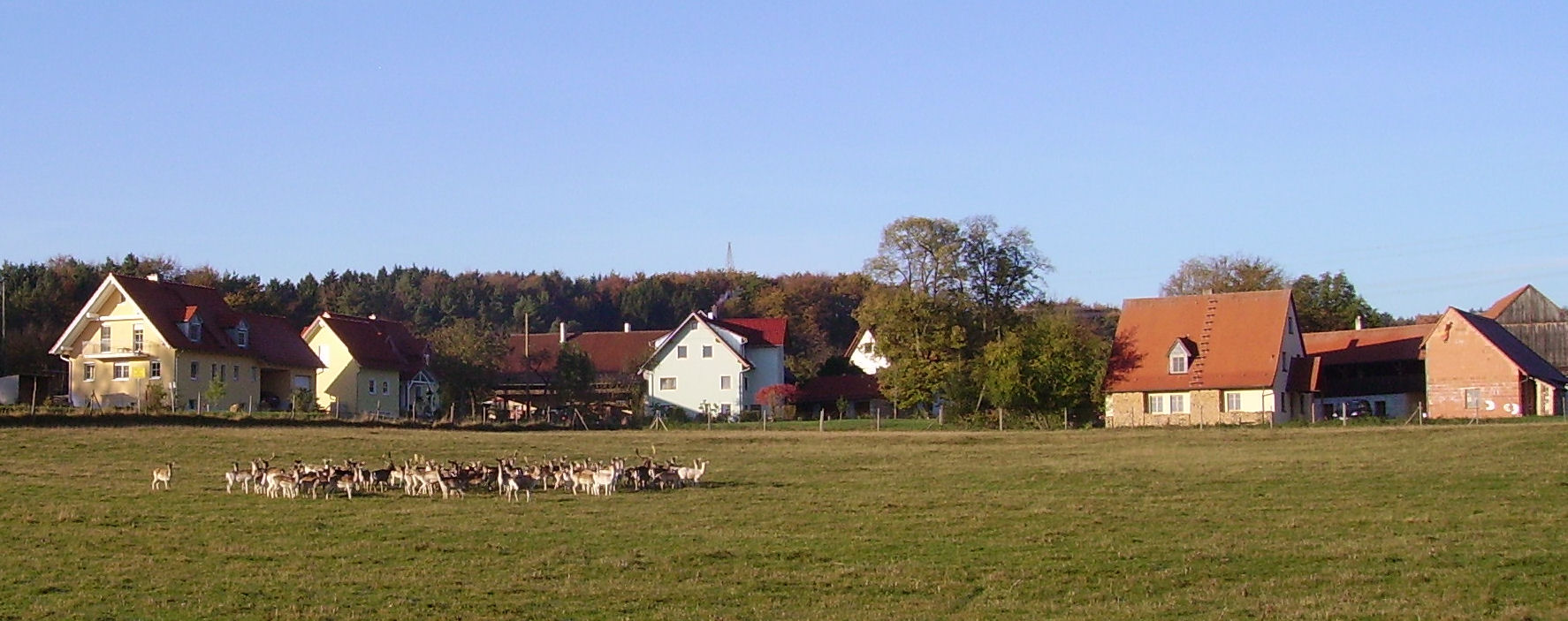 view of Geisdorf, part of Heiligenstadt in Oberfranken in northern Bavaria, Germany